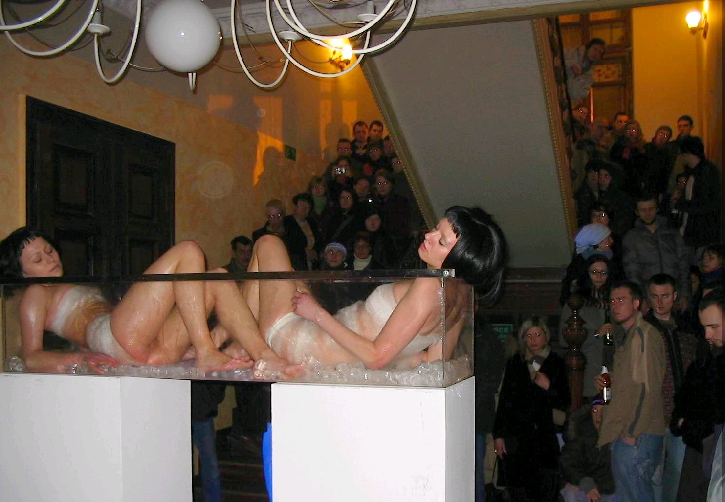 Performance grupy Sędzia główny. Galeria "Galera" w Zielonej Górze